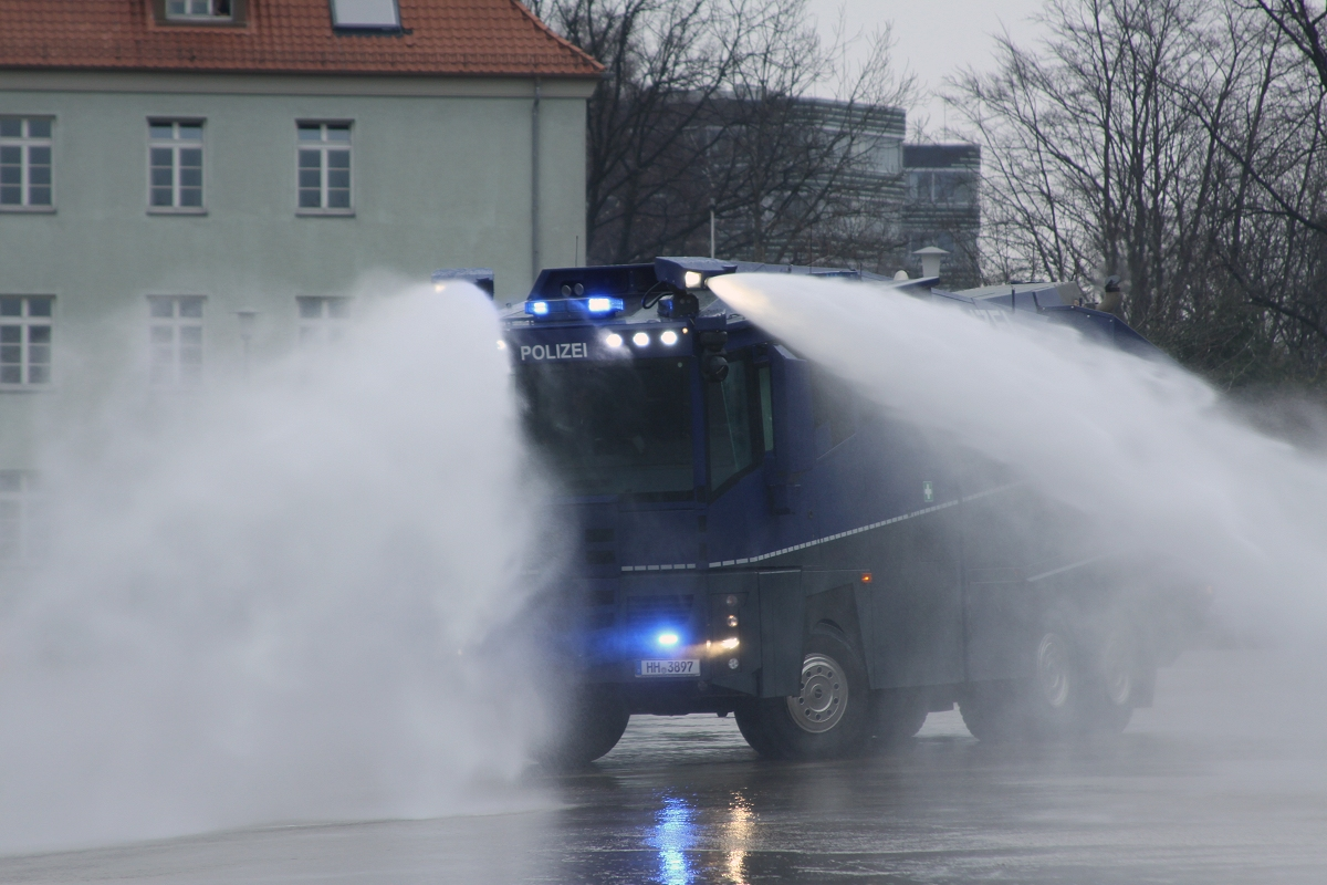 Wasserwerfer WaWe 10.000 der Hamburger Bereitschaftspolizei